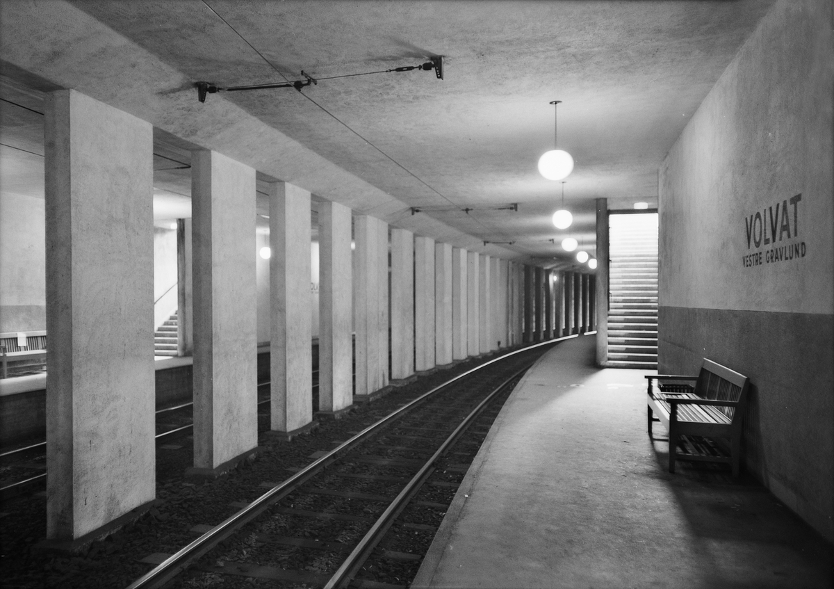 Volvat stasjon er en nedlagt stasjon i Oslos T-banesystem beliggende på Volvat. Stasjonen ligger mellom Majorstuen og Borgen. Stasjonen ble nedlagt i 1997